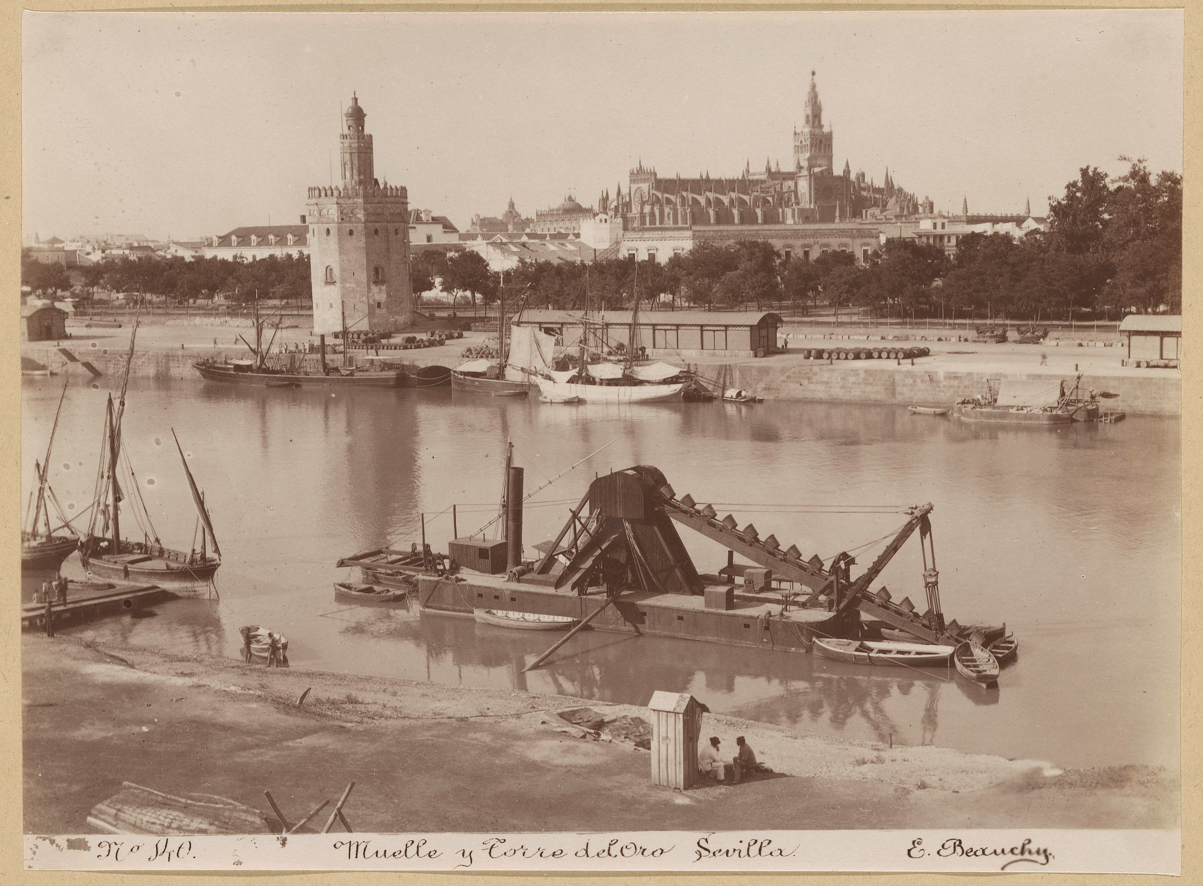 IdentificatieTitel(s): Muelle y Torre del Oro SevillaObjecttype: foto Objectnummer: RP-F-F01139-CYVervaardigingVervaardiger: fotograaf: Emilio BeauchyDatering: ca. 1850 - ca. 1880Fysieke kenmerken: albuminedrukTechniek: albuminedrukOnderwerpWaar: SevillaVerwerving en rechtenVerwerving: overdracht van beheer 1994Copyright: Publiek domein